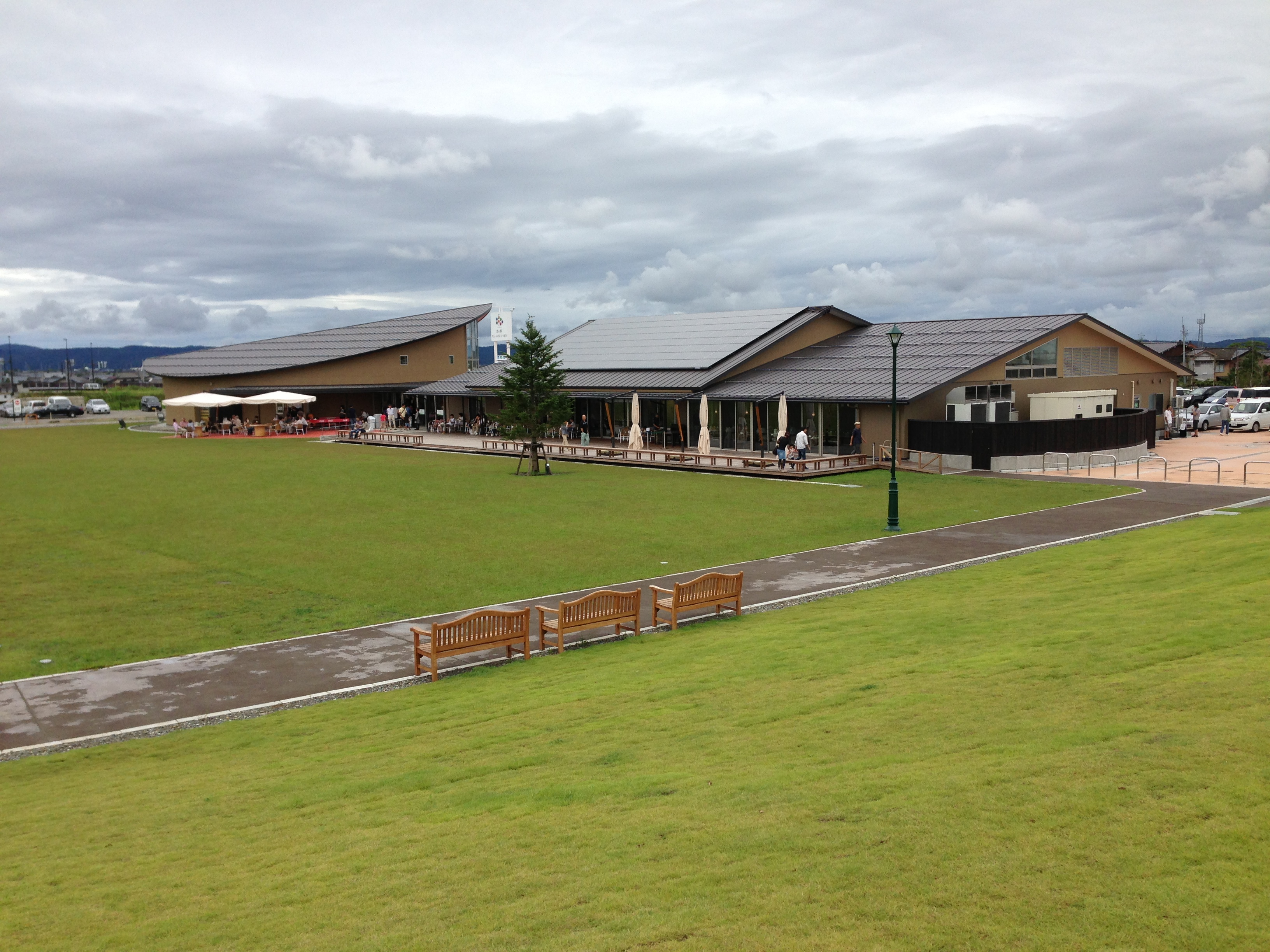 新潟県見附市にある「道の駅パティオにいがた」を裏側から撮った写真